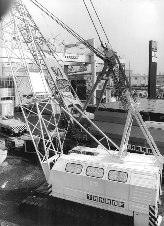 Leipzig, Frühjahrsmesse, Freigelände, Container-Vollportalkran ADN-ZB Kluge 10.3.84 pe Leipzig: Frühjahrsmesse 84-Der Raupendrehkran RDK 500 gehört zu den Neuentwicklungen des VEB Schwermaschinenbaukombinat TAKRAF, die auf dem Freigelände der Messe ausgestellt sind. Der mobile Auslegekran wurde im BEB Zemag Zeitz hergestellt. Er hat eine maximale Tragfähigkeit von 50 t und dient zur Montage von Stahlbeton- und Stahlkonstruktionen sowie technologischen Ausrüstungen von Industrieanlagen. Im Hintergrund sieht man den Eisenbahndrehkran EDK 1000-4.